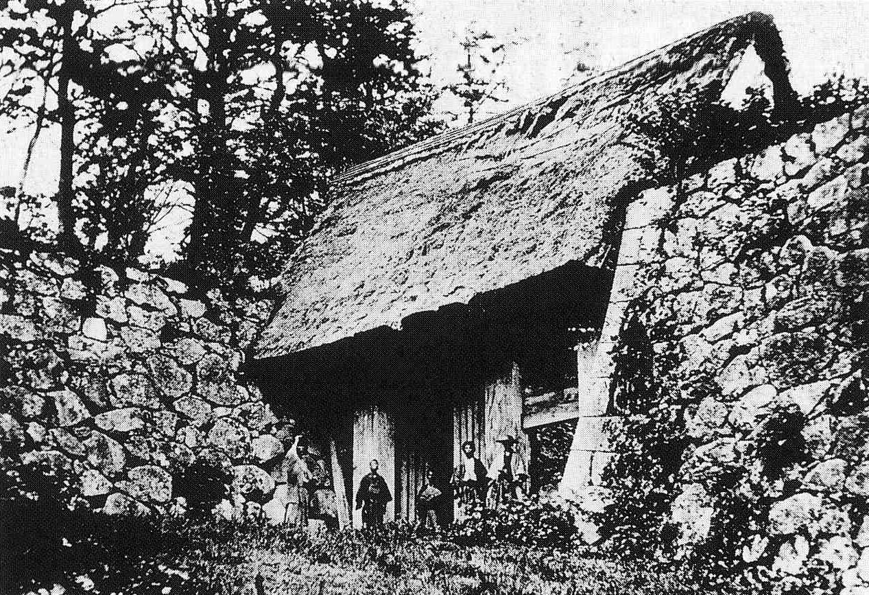 松坂城の裏門